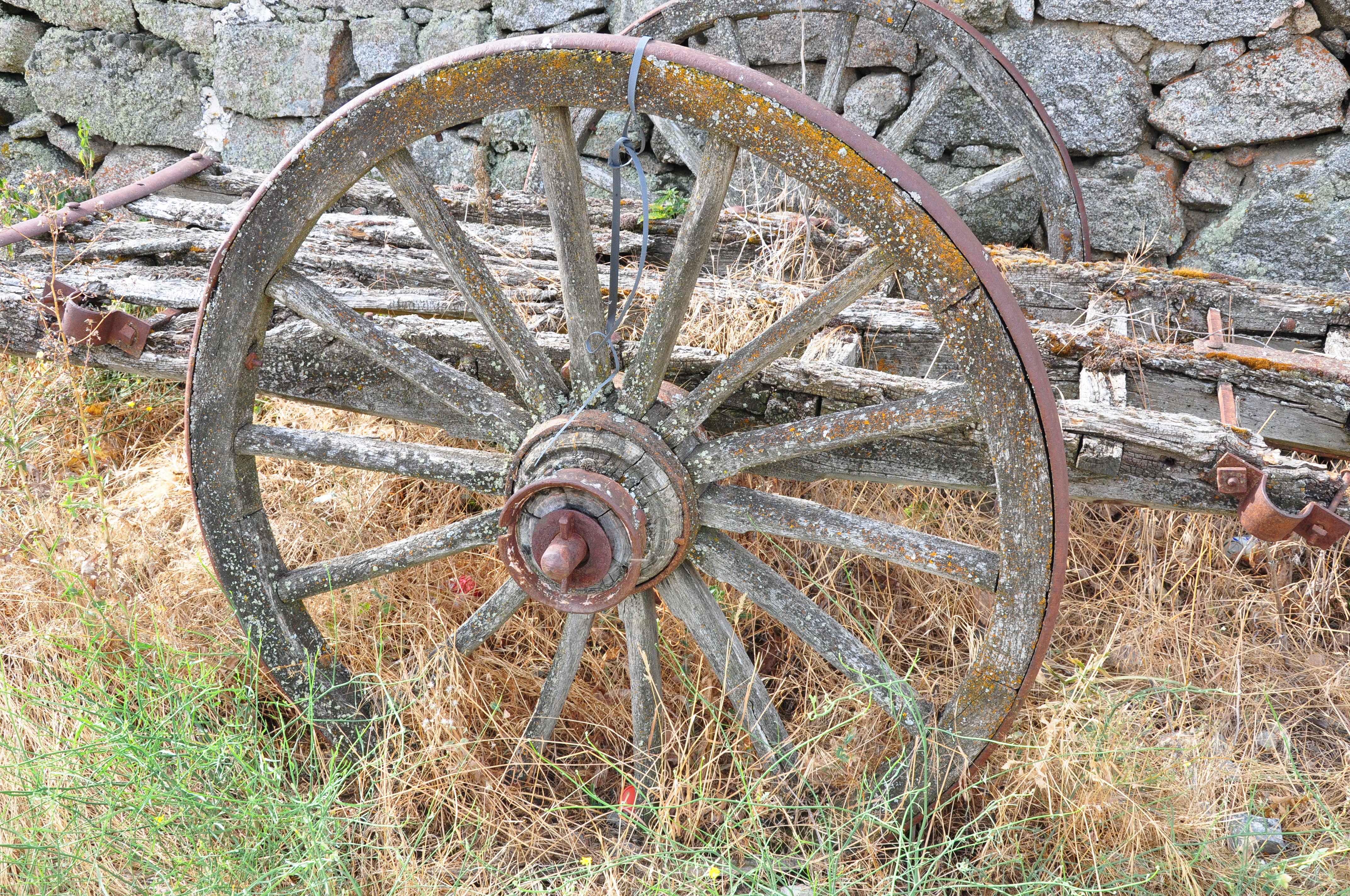 Carro en Sanchicorto (La Torre-Ávila), España.